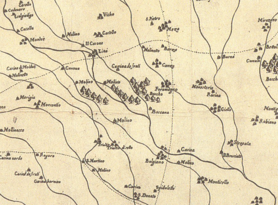 Mappa di Giovanni Battista Clarici (eseguita 1600) di Milano e dintorni